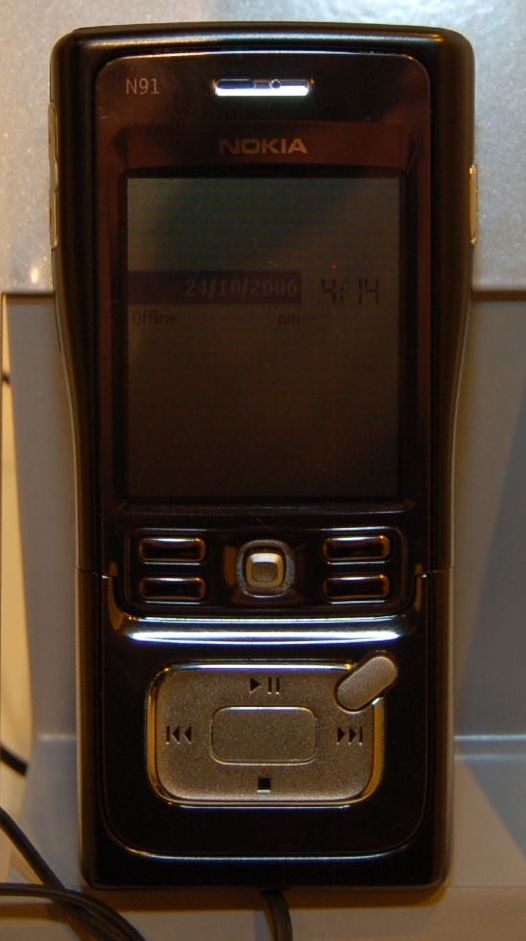 Nokia N91 8GB mobile phoneN80